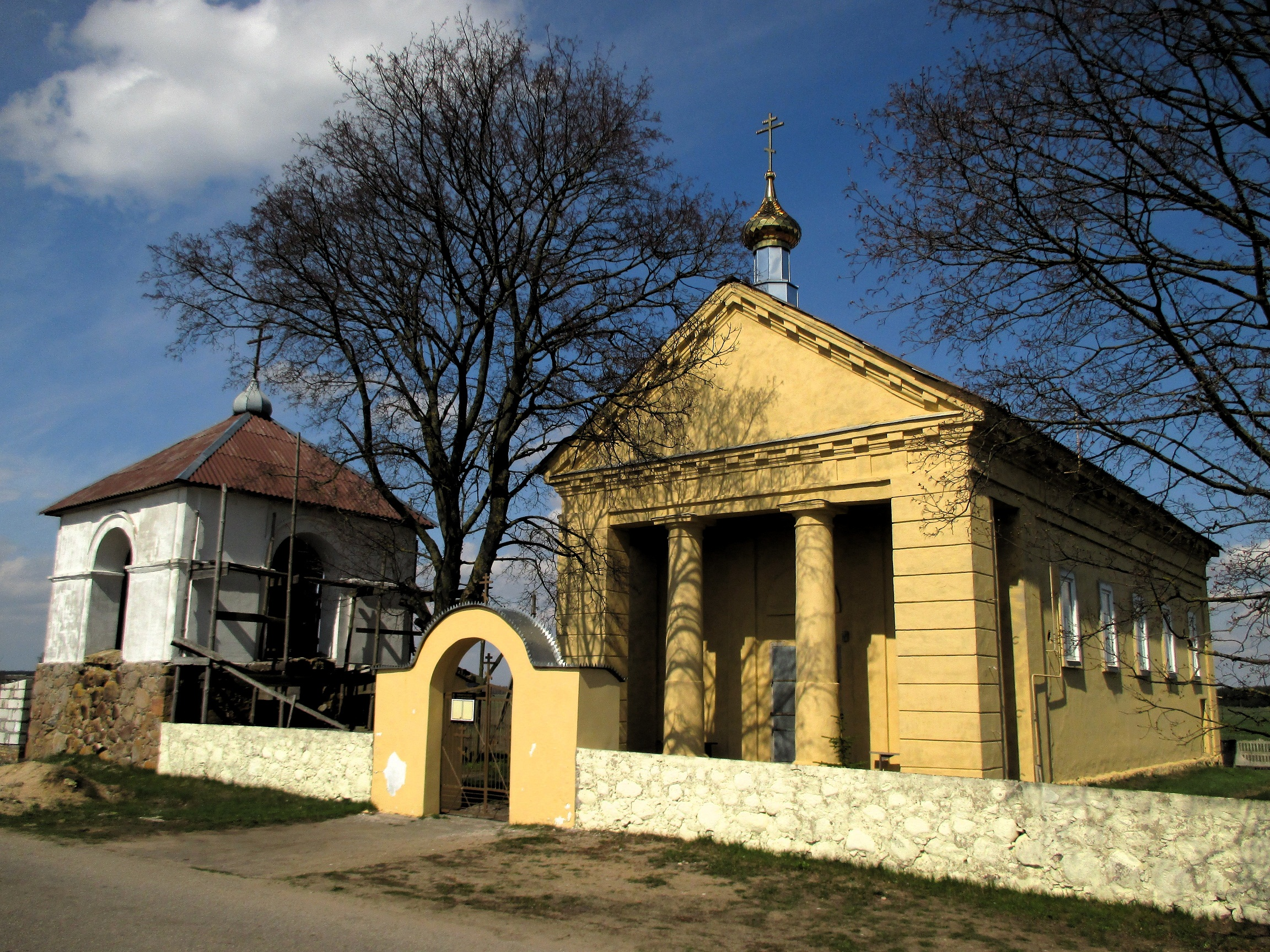 Спаса-Праабражэнская царква, Дзікушкі, Лідскі раён, Беларусь